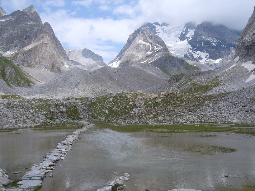 Lac des vaches, dans la vallée de la Glière sur les hauteurs de Pralognan-la-Vanoise, à l'approche du Col de la Vanoise. En arrière plan, la Grande Casse. 15/07/2006 Bel Adone 25 juillet 2006 à 08:05 (CEST) Personal picture, I set in public domain.